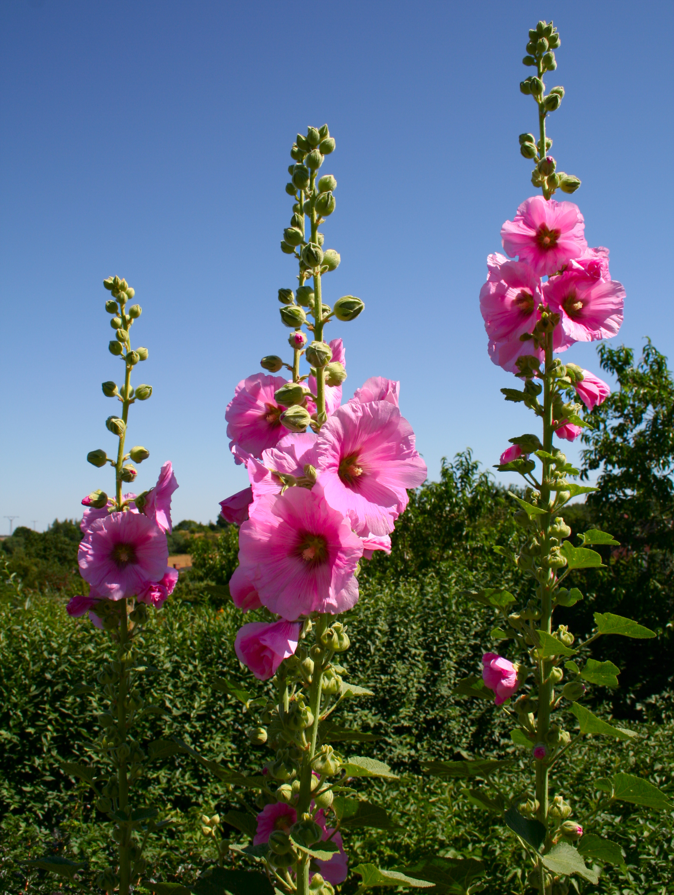 Stockrose